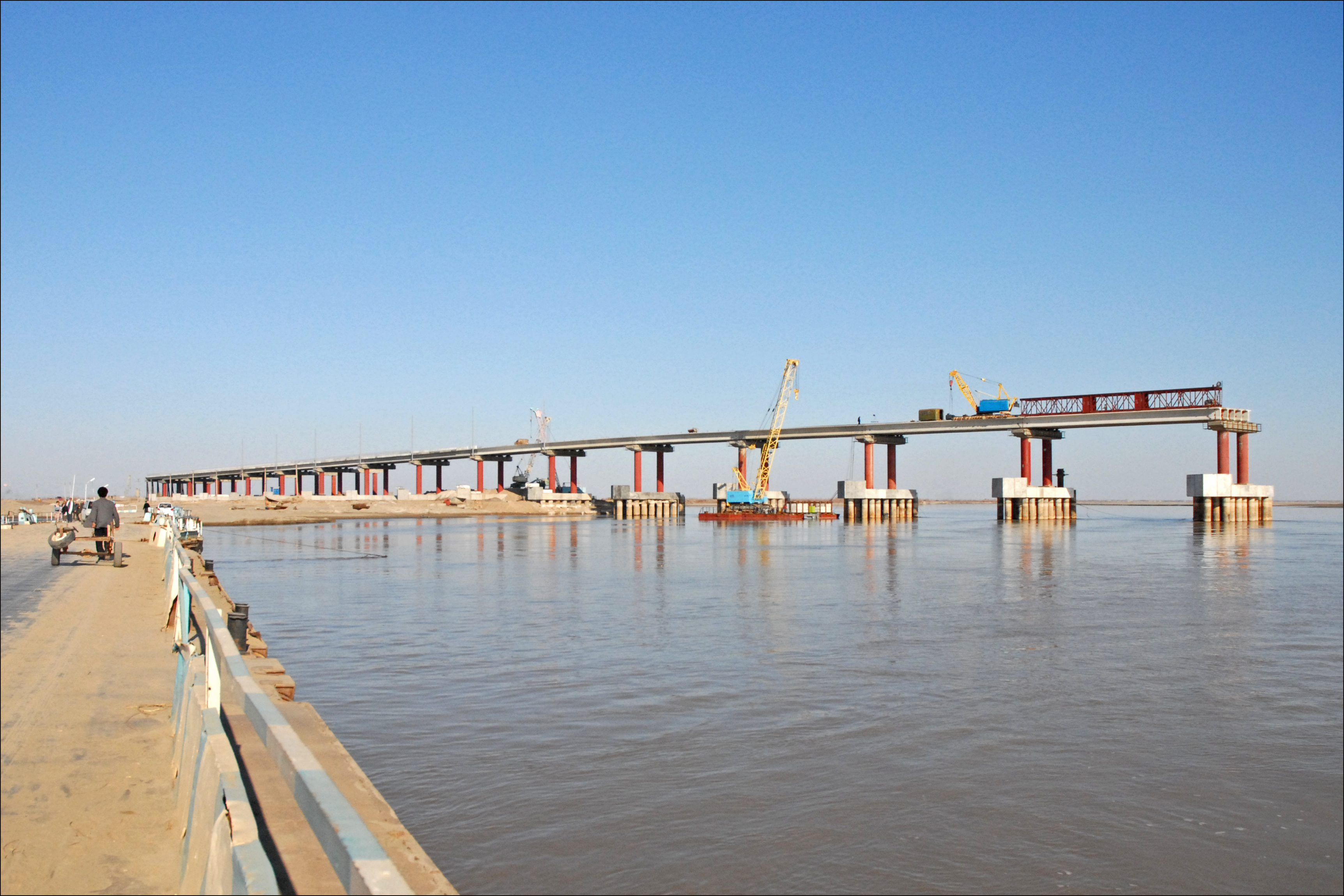 Le pont de Berouni en construction sur l'Amou Darya (Amou Daria) . A gauche, le pont temporaire de barges. Long de 1437 Km, le fleuve Amou Darya prend sa source dans l'Hindou Kouch, et traverse les hauts plateaux du Pamir au Tadjikistan avant de se diriger vers la mer d'Aral à travers le désert. Il était en basses-eaux au moment de la prise de la photo en mars 2011. Appelé l'Oxus dans l'Antiquité, il a été traversé en 329 avant J.-C. par l'armée d'Alexandre, le roi de Macédoine, au moment de sa conquête de la Transoxiane (le pays au-delà du fleuve), auquel appartenait la Sogdiane dont Samarcande (appelée Marancanda dans l'Antiquité) était la capitale. L'Amou Darya a de tout temps constitué la frontière des mondes turc (désert de Kyzyl Koum en Ouzbékistan) et persan (désert de Kara Koum au Turkménistan). Il a changé de cours de nombreuses fois dans l'histoire. Son débit a beaucoup baissé depuis un siècle en raison des barrages et des canaux d'irrigation qui ont été créés à l'époque soviétique, en aval du fleuve, pour l'irrigation des champs et en particulier pour la culture du coton dont l'Ouzbékistan est un des grands producteurs mondiaux. L'assèchement de la mer d'Aral et la salinisation croissante des terres du pays sont des conséquences catastrophiques de cette politique d'irrigation mal maitrisée.